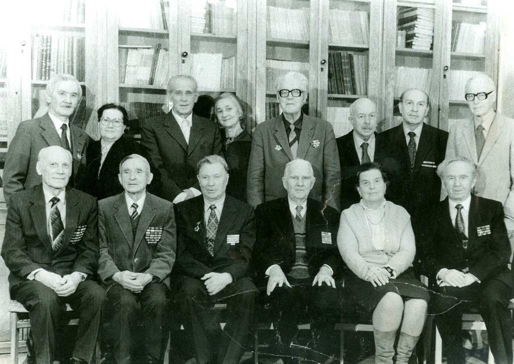 Ветераны войны ИИЕТ РАН: Стоят: Владимир Васильевич Балабин, Ираида Васильевна Баландина, Илья Семёнович Тимофеев, Татьяна Дмитриевна Ильина, Александр Филиппович Плахотник, Георгий Анатольевич Лахтин, Николай Константинович Ламан, Николай Михайлович Коробов Сидят: Евгений Александрович Шитиков, Владимир Никитич Краснов, Василий Алексеевич Есаков, Степан Гаврилович Корнеев, Галина Евгеньевна Павлова, Владимир Степанович Курнаух